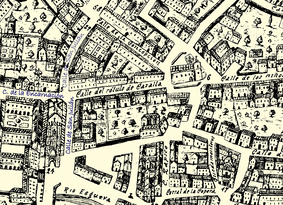 Plano parcial de la ciudad de Valladolid de Ventura Seco, 1738. Se aprecia la zona de San Benito y la iglesia parroquial desaparecida (nº 5) de San Julián y Santa Basilisa.